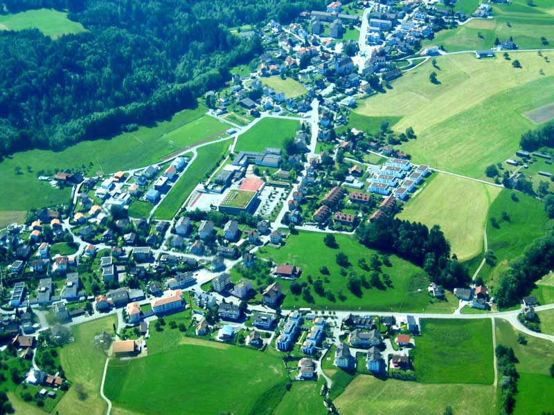 Engelburg, Schweizer Ortschaft im Kanton St. Gallen, Ansicht Dorfunterhälfte